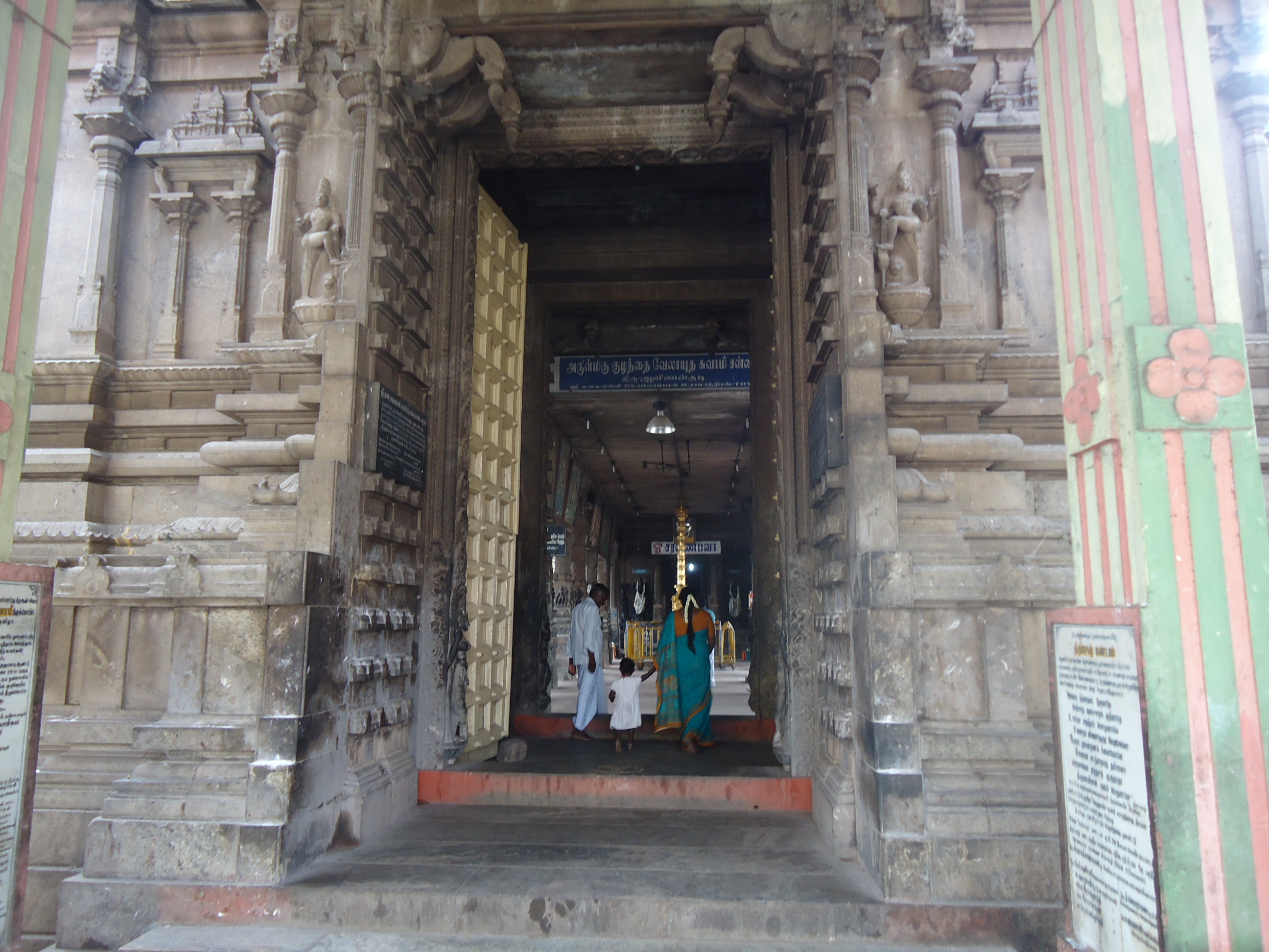 Palani Base Temple Entrance